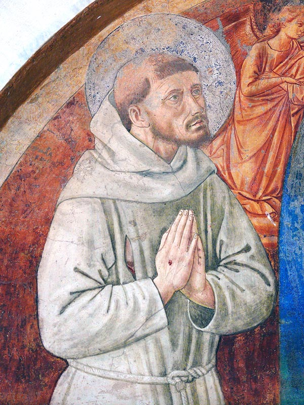 Benozzo Gozzoli, Fresco: Convento di San Fortunato (Montefalco) - Virgin and Child, detail